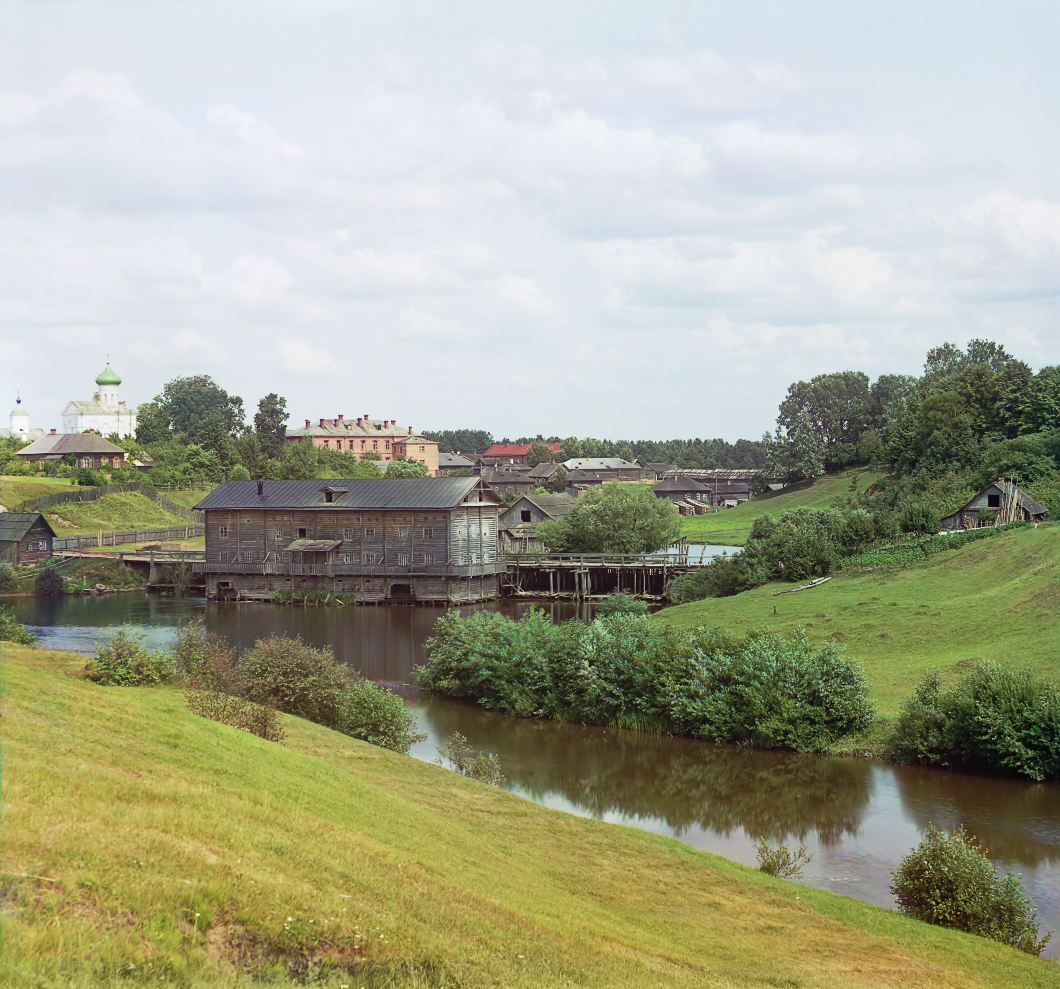 Беларуская (тарашкевіца): Полацак. Млын рацэ Палата і Спаскі манастыр